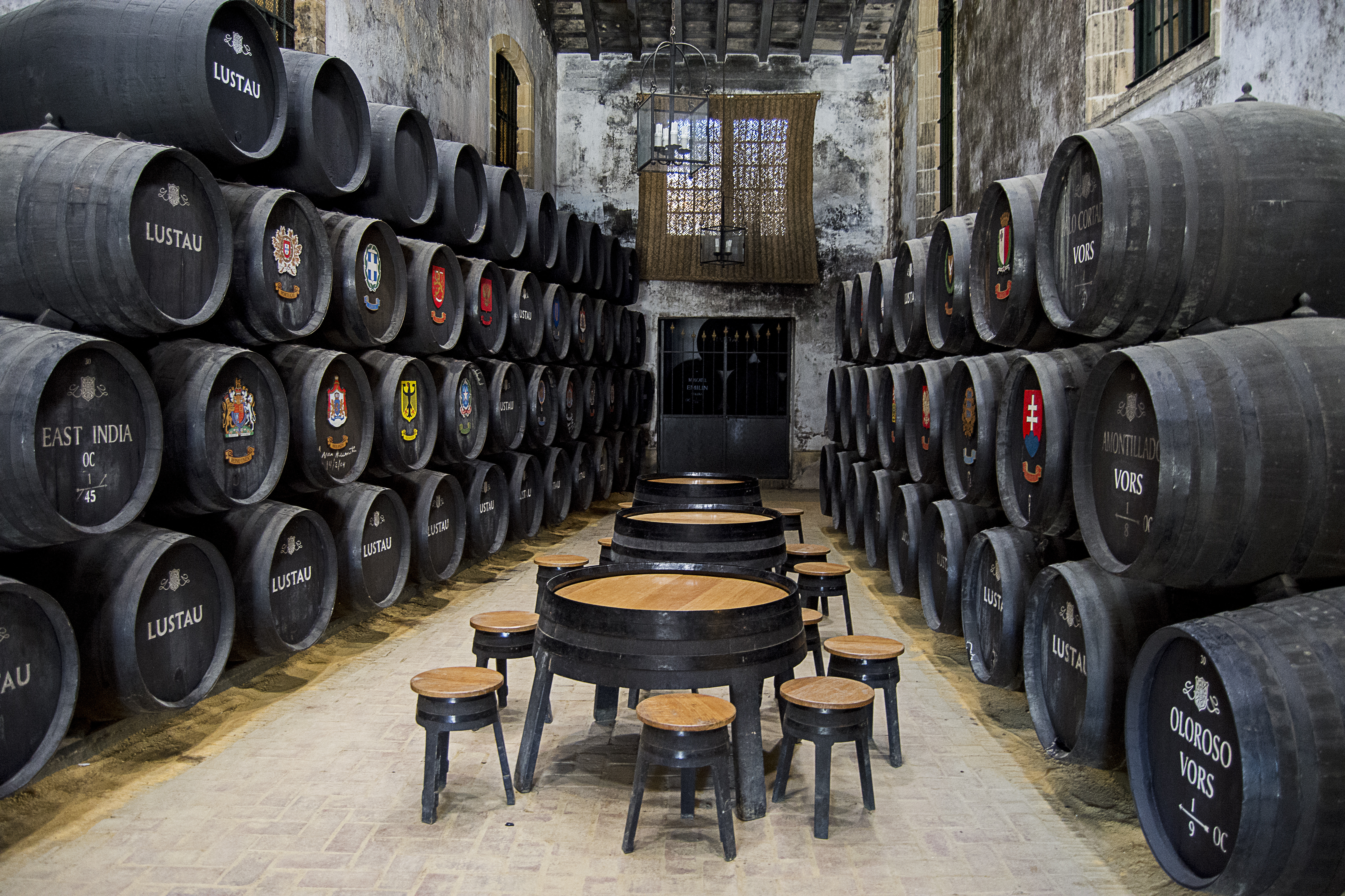 Vista del Interior de la "sacristía" de las bodegas Lustau en Jerez de la Frontera.